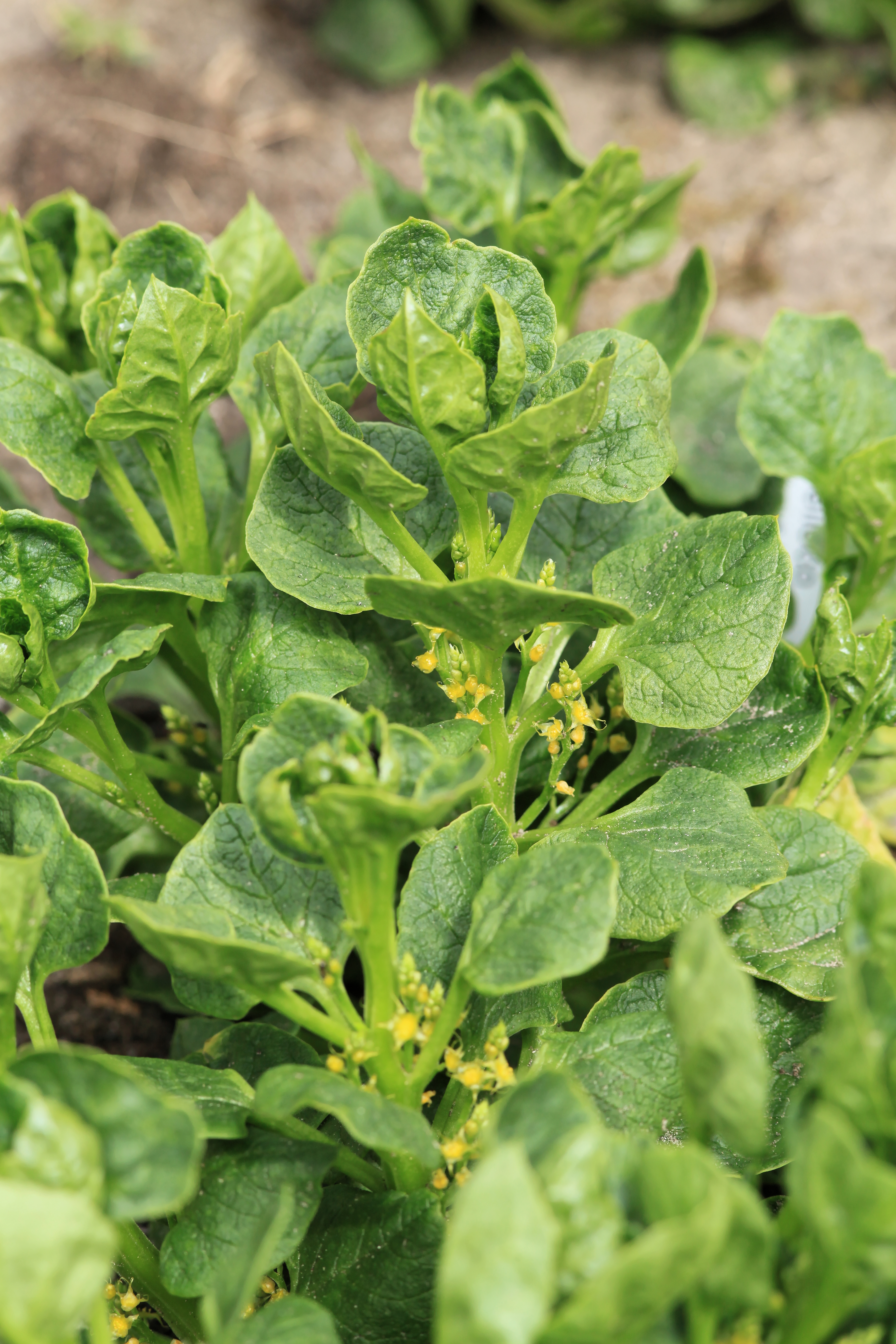 Ullucus tuberosus grown in a garden in Kluse (Emsland)